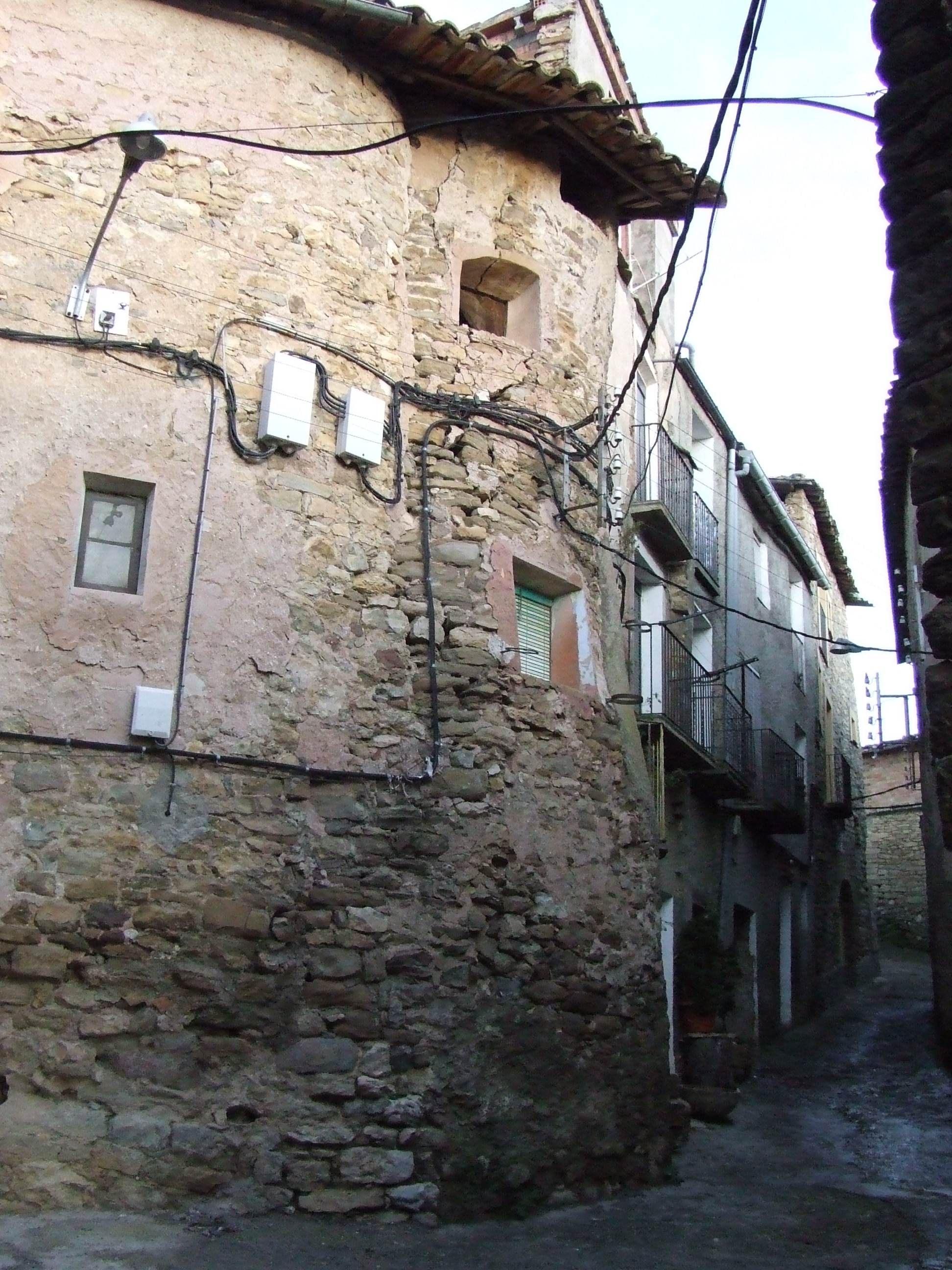 Restes d'una torre del poble clos (Sant Serni, Gavet de la Conca, Pallars Jussà)